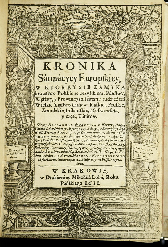 Тытульны аркуш Kronika Sarmacyey Europskiey (Хроніка Еўрапейскай Сарматыі). Кракаў. 1611